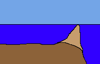 schematische Darstellung eines Barriereriffs